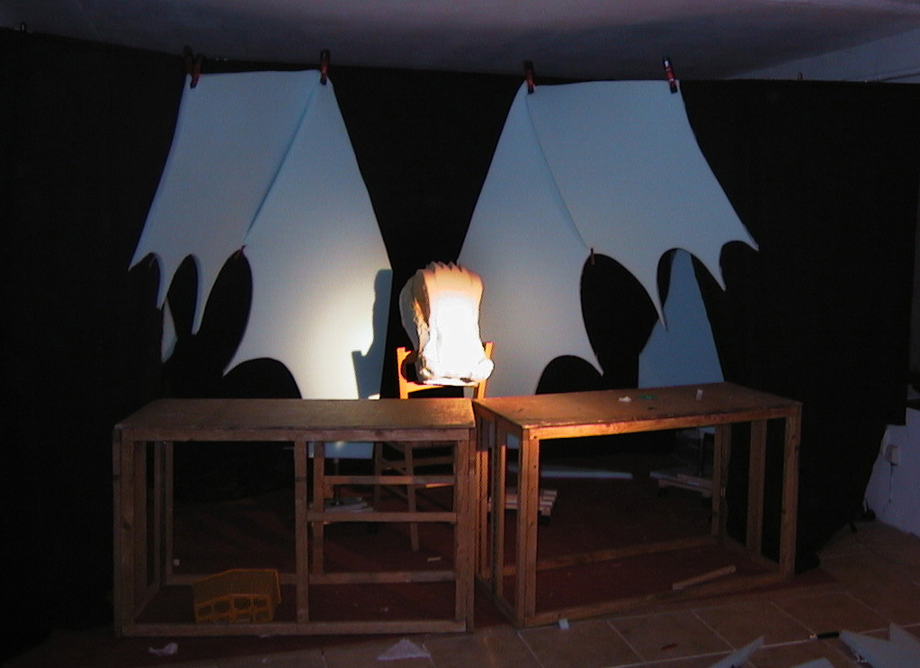 Großfigur, Tischfigur, Klappmaulfigur - Drache im Bauzustand (Figurentheater Winter, Eine Hand voll Drachenfeuer)